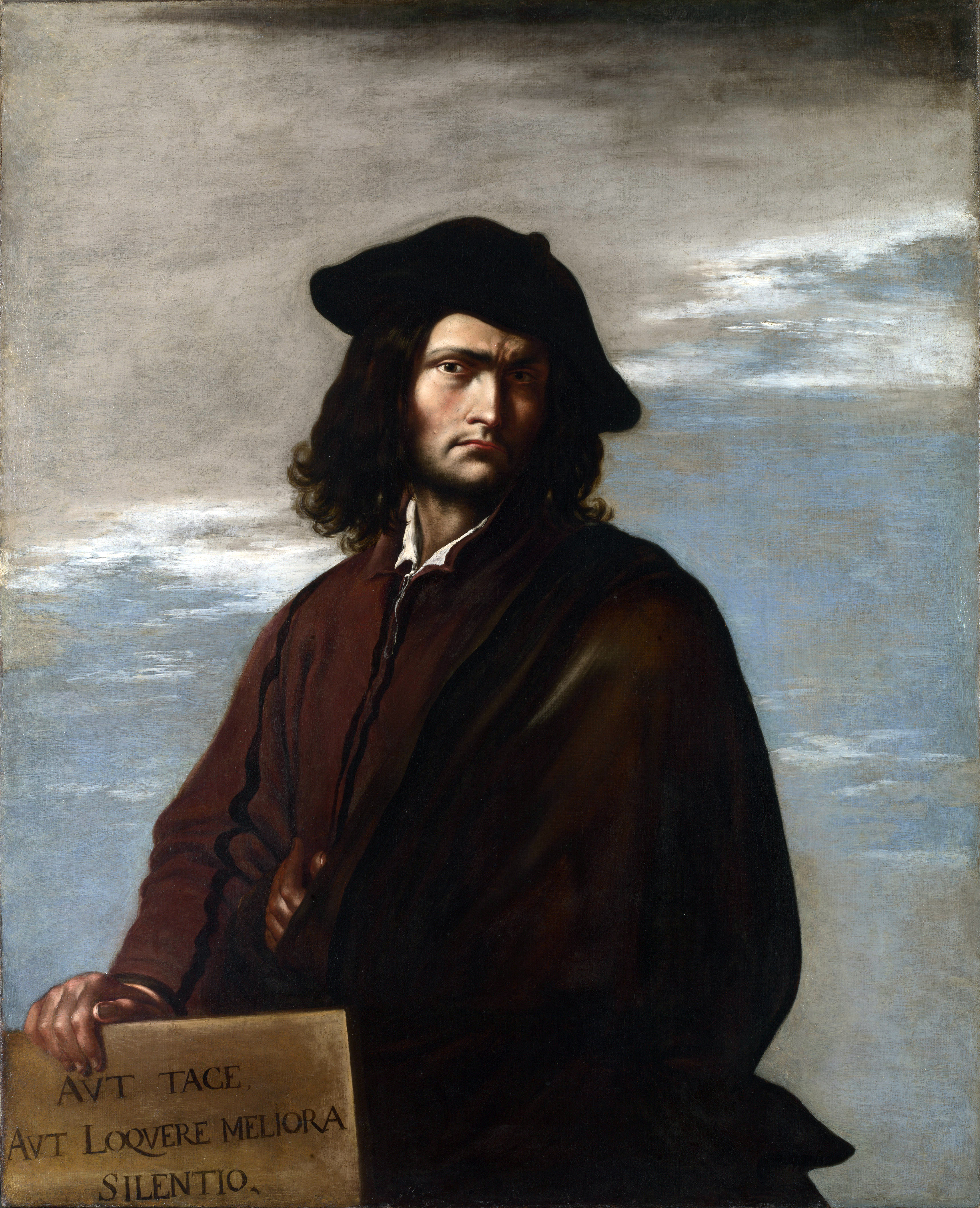 Self-portrait